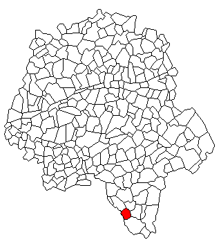 Localisation de Chambon en Indre et Loire